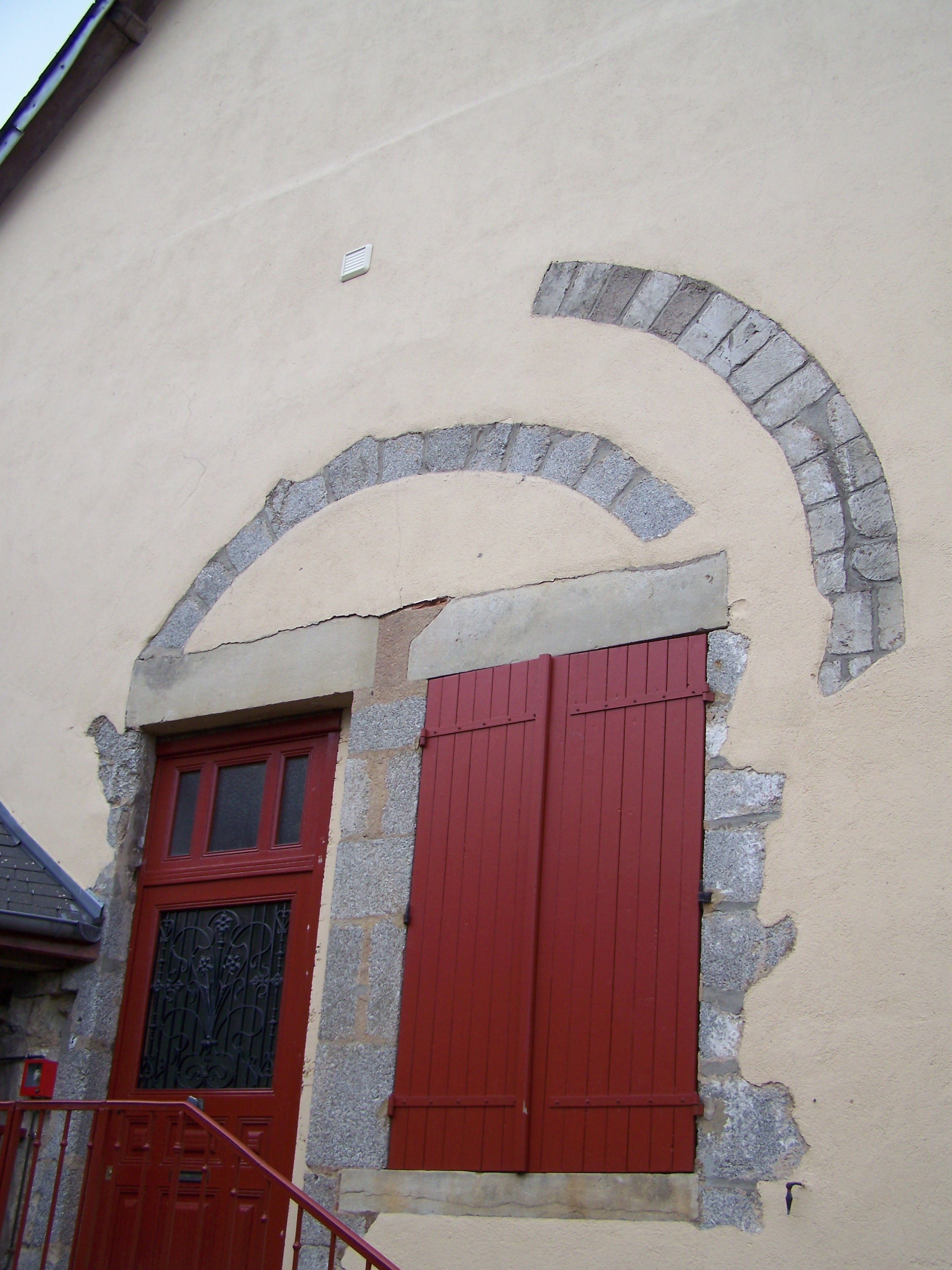 Vestiges d'un arc en plein cintre et d'un arc rampant pris dans la maçonnerie d'une maison au n° 3 de la place Saint-Christophe à Château-Chinon (Ville) (Nièvre, France). Il pourrait s'agir de vestiges de l'ancien prieuré Saint-Christophe.